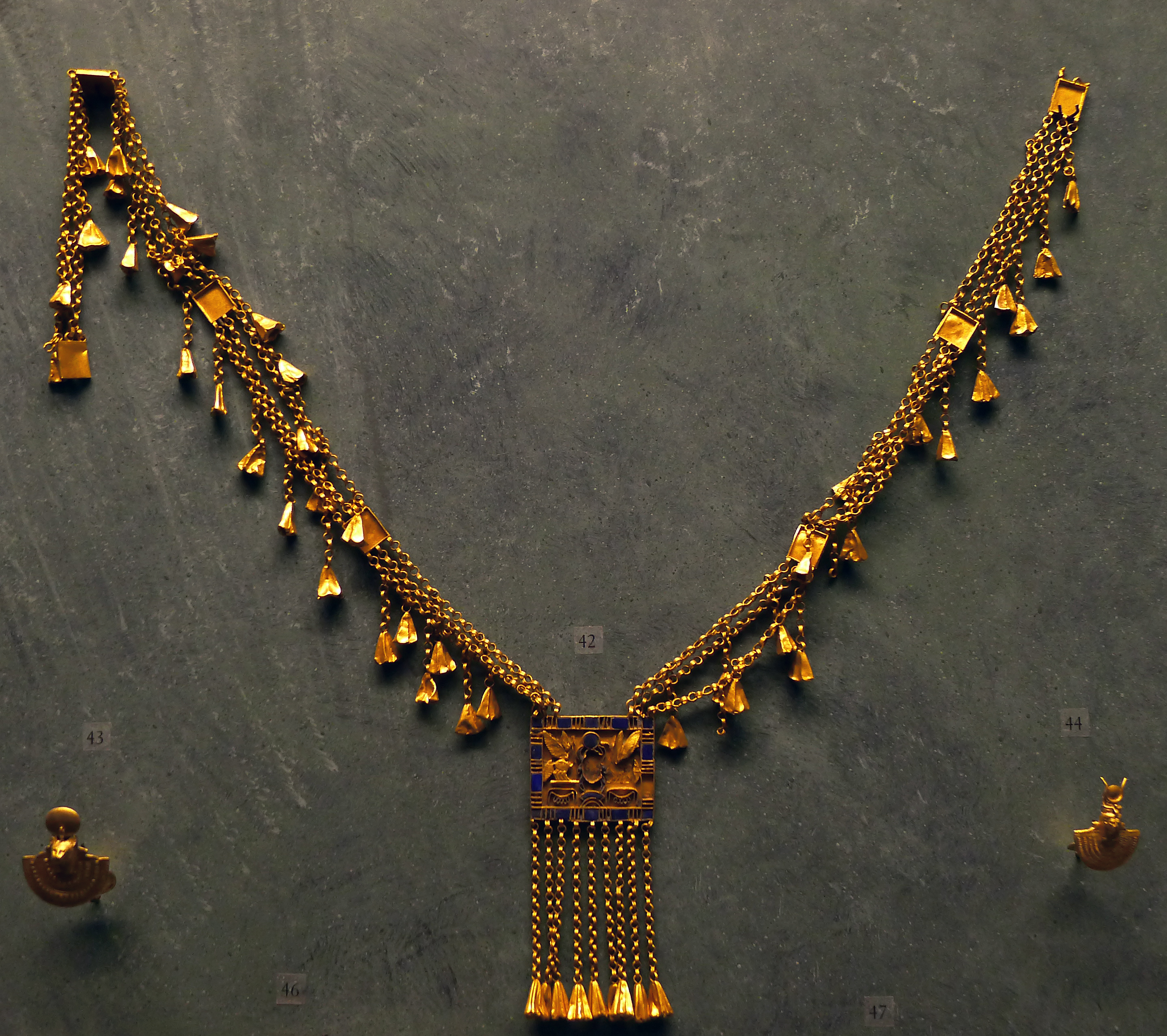 Collier composé de trois chaines d’anneaux plats soudés deux à deux et d’un pendentif rectangulaire incrusté de lapis-lazuli portant le nom de « Pinedjem Ier » entouré de deux abeilles : des chainettes ornées de pendeloques florales et attachées aux chaines extérieure et intérieure ainsi qu’à la partie inférieure du pendentif le complètent.